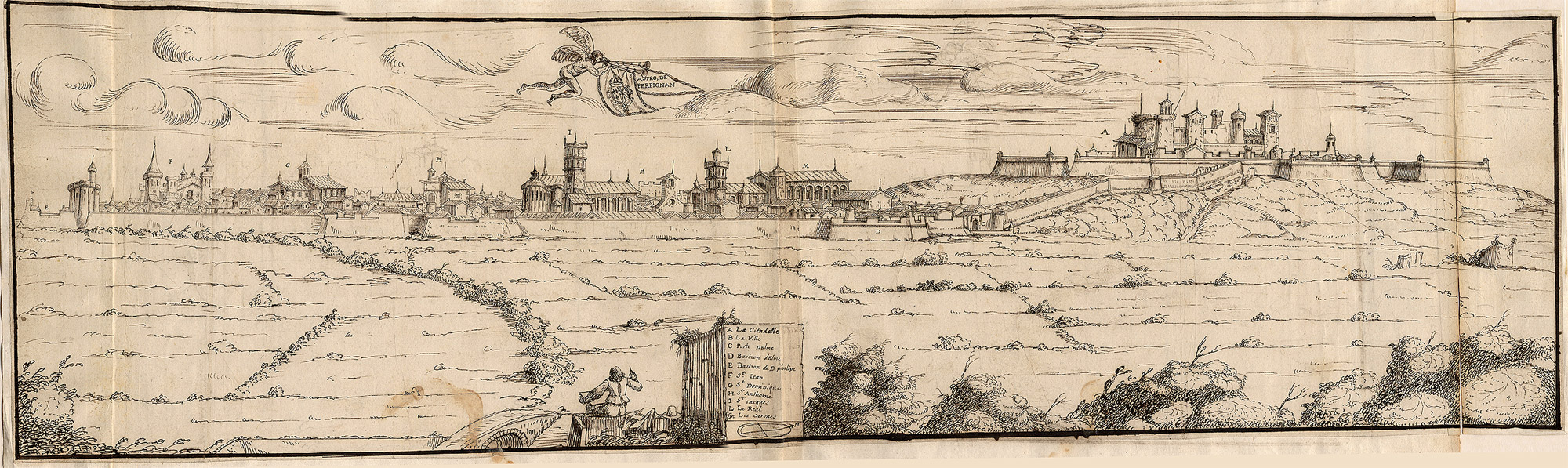 Vue de Perpignan (Pyrénées-Orientales - France) en 1642